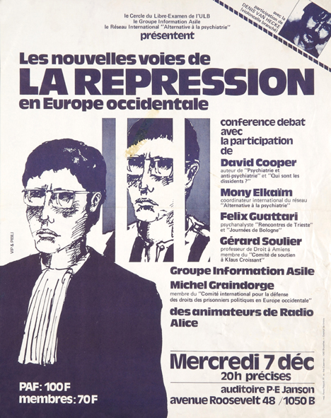 Cercle du Libre Examen 7 décembre 1977